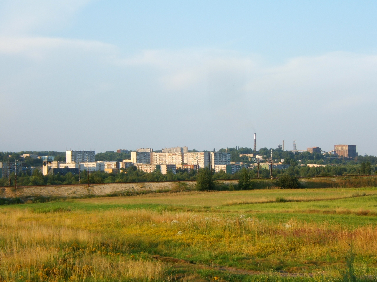 Panorma Bykowiny (dzielnica Rudy Śląskiej) od południowego-zachodu.